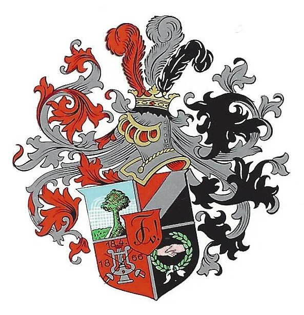 Studentenwappen des Corps Teutonia Berlin